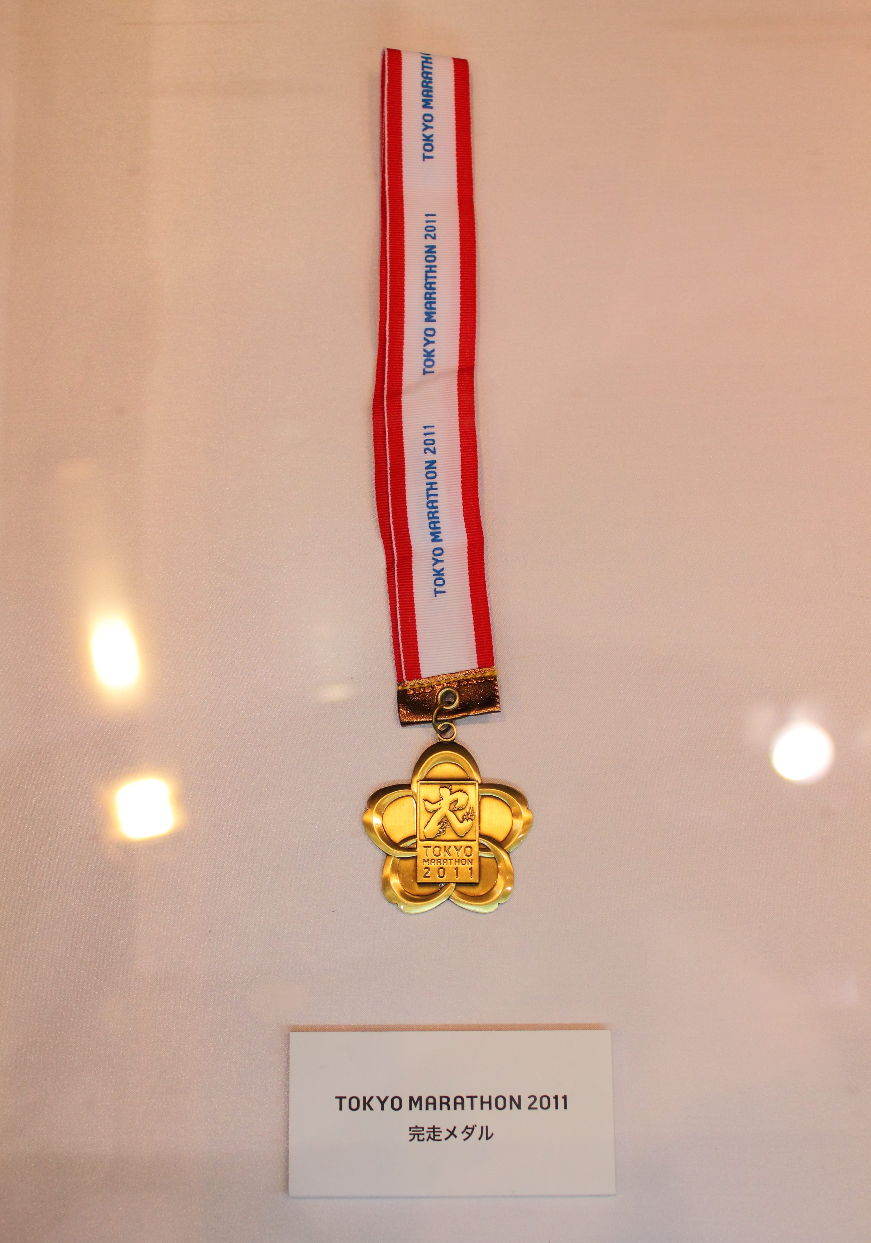 東京マラソン完走メダル